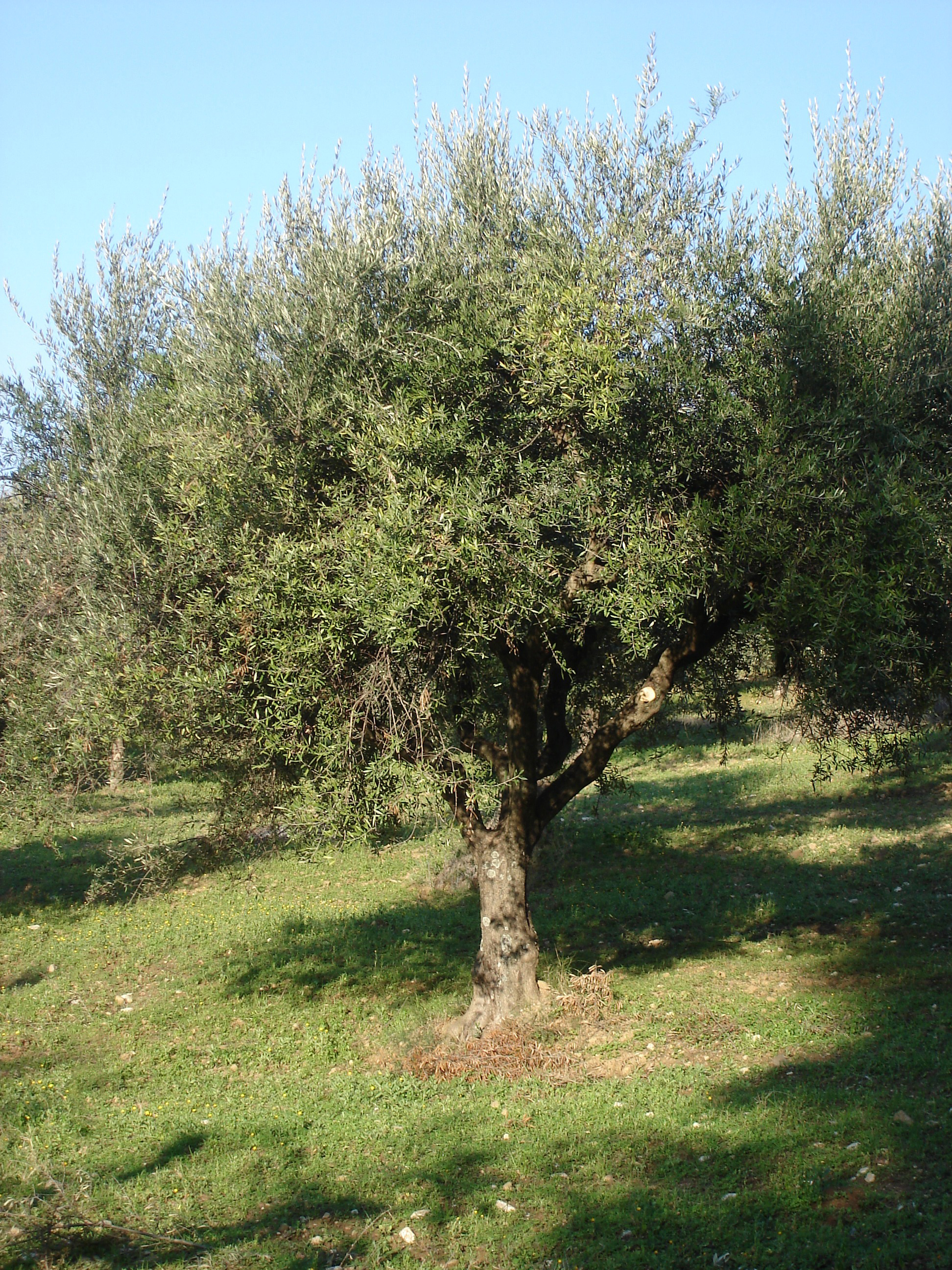 Elia